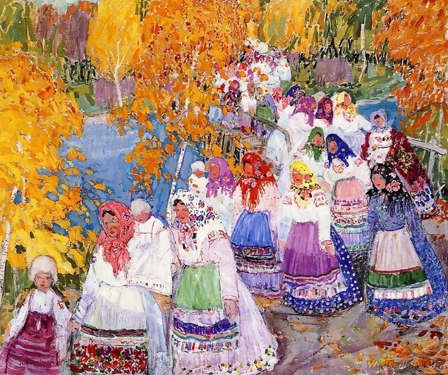 Russian Peasant Parade, Leon Gaspard (painting)